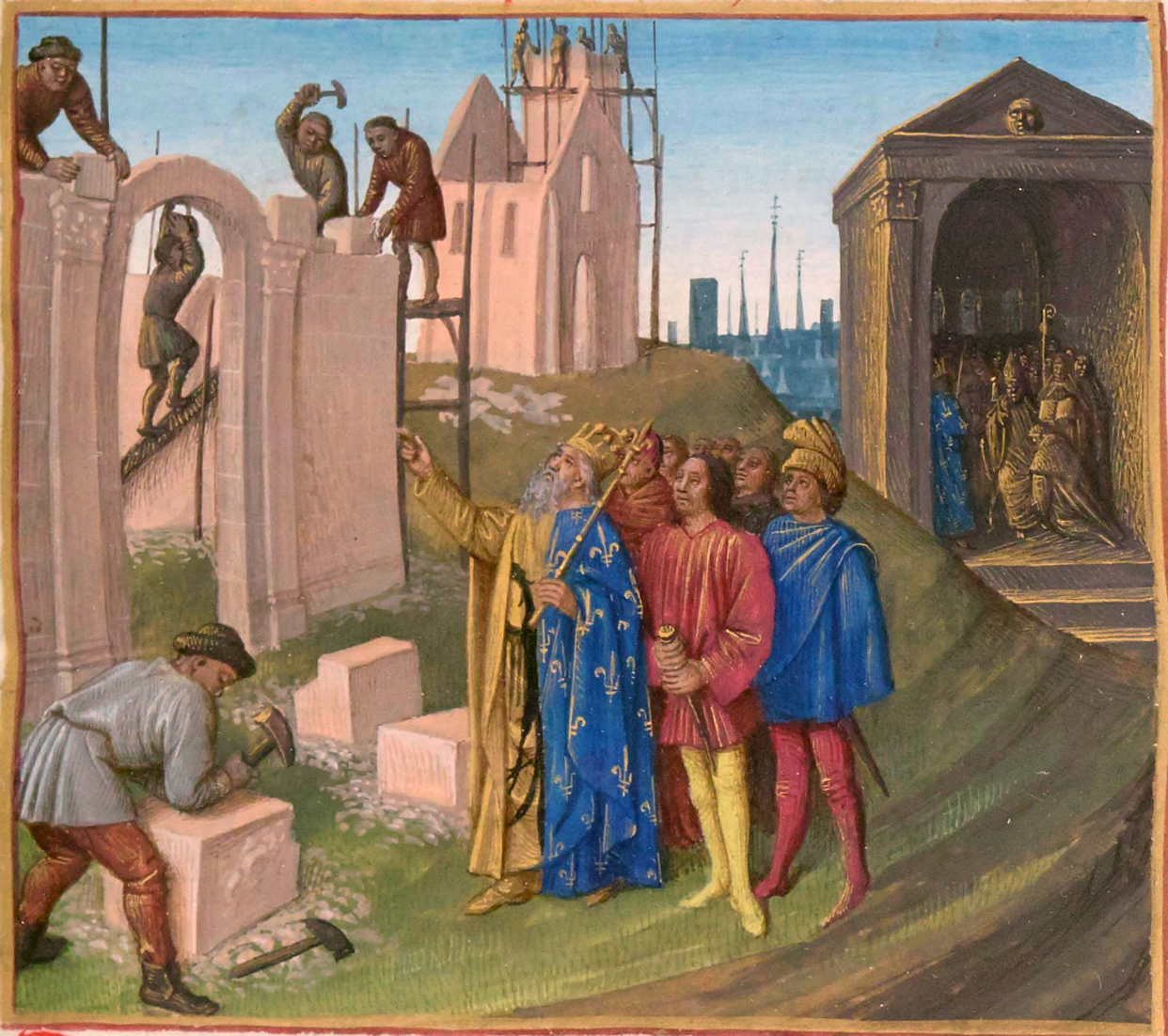 Construction d'Aix-la-Chapelle. Pépin le Bossu devenant moine. Grandes Chroniques de France, enluminées par Jean Fouquet, Tours, vers 1455-1460 Paris, BnF, département des Manuscrits, Français 6465, fol. 96 (Troisième Livre de Charlemagne) Construction d'Aix-la-Chapelle : L'empereur Charlemagne visite un chantier, vraisemblablement celui du palais d'Aix-la-Chapelle. Pépin le Bossu devenant moine (en arrière-plan à droite) : Après avoir découvert le complot de son fils naturel Pépin le Bossu, Charlemagne assiste à son entrée dans les ordres.